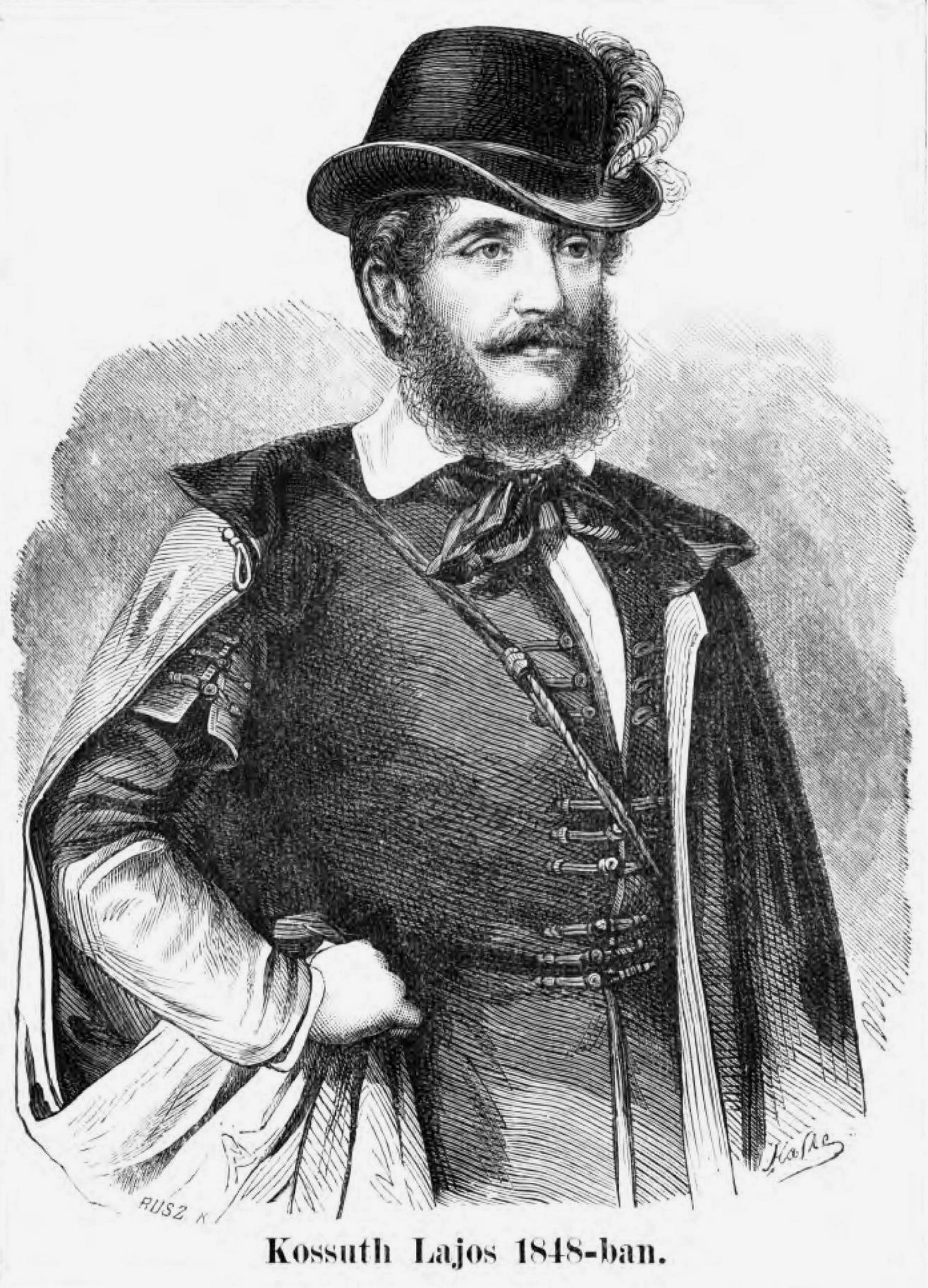 Kossuth Lajos kalapban 1848-ban